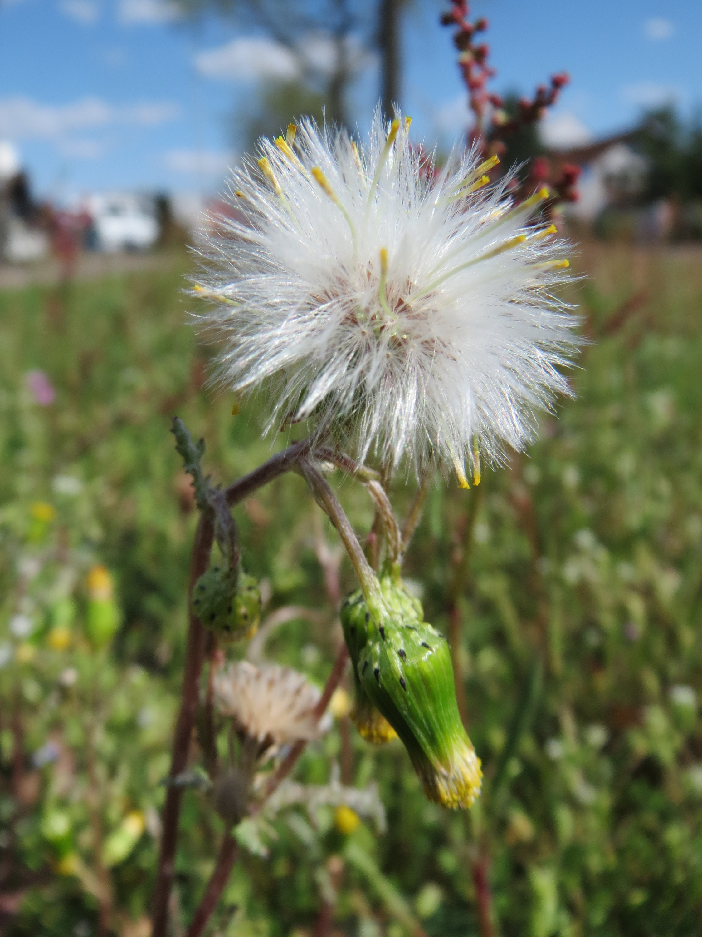 Gewöhnliches Greiskraut (Senecio vulgaris) in Hockenheim